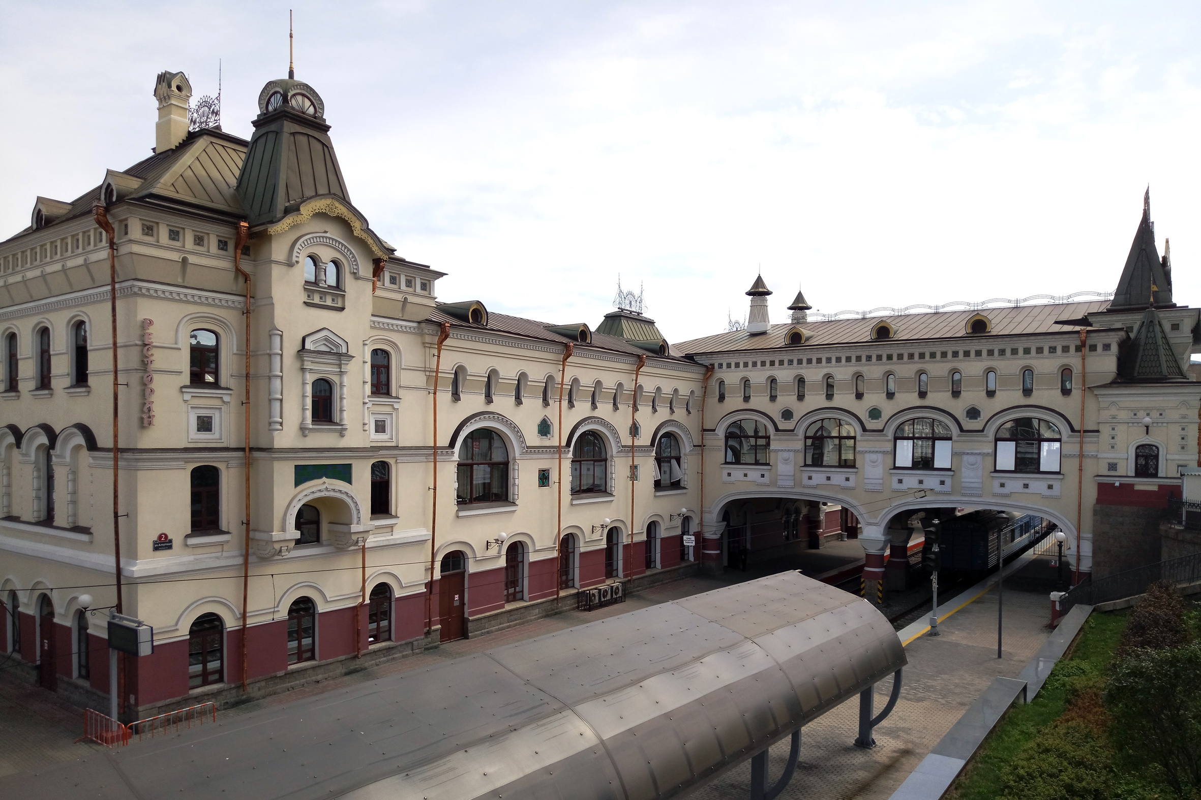 Здание железнодорожного вокзала, связанное с революционными событиями 1905-1906 гг. и борьбой в годы Гражданской войны и интервенции 1917-1922 гг.: улица Алеутская, 2 (площадь Вокзальная), Владивосток, Приморский край